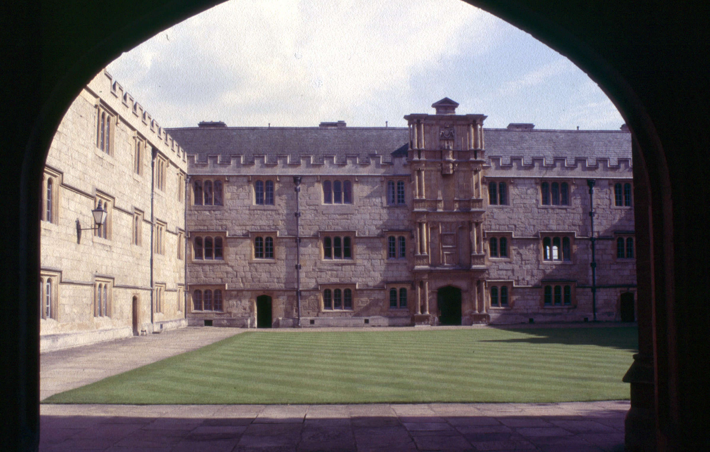 1985 in Oxford